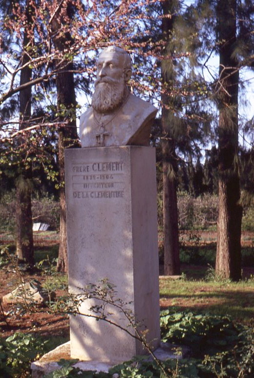 Pierre tombale du frère Clément à Misserghin créateur de la clémentine